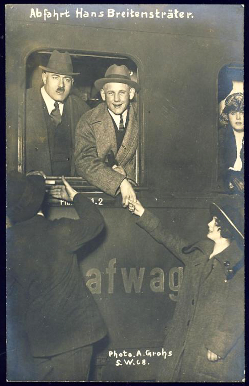 Fotoabzug als Ansichtskarte mit handschriftlichem Titel Abfahrt Hans Breitensträter (im Schlafwagen einer Eisenbahn, hier in Begleitung und mit einer Hand an einer Verehrerin) und dem Hinweis "Photo. A. Grohs, S.W. 68" ...